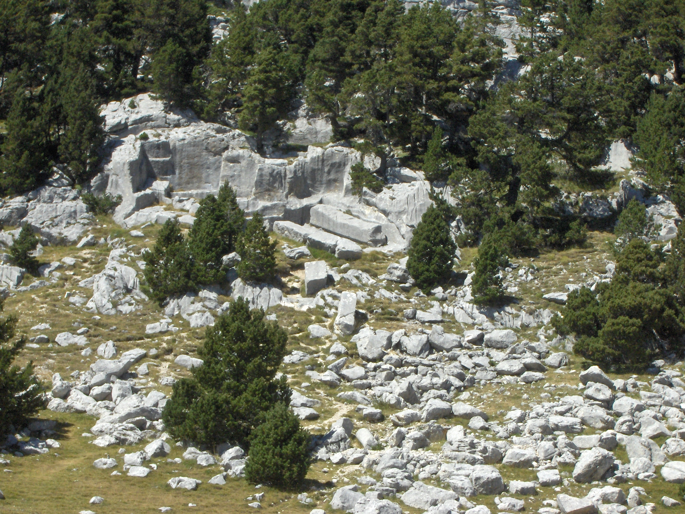 Colonne taillée et d'autres blocs prêts à être descendu dans la plaine.